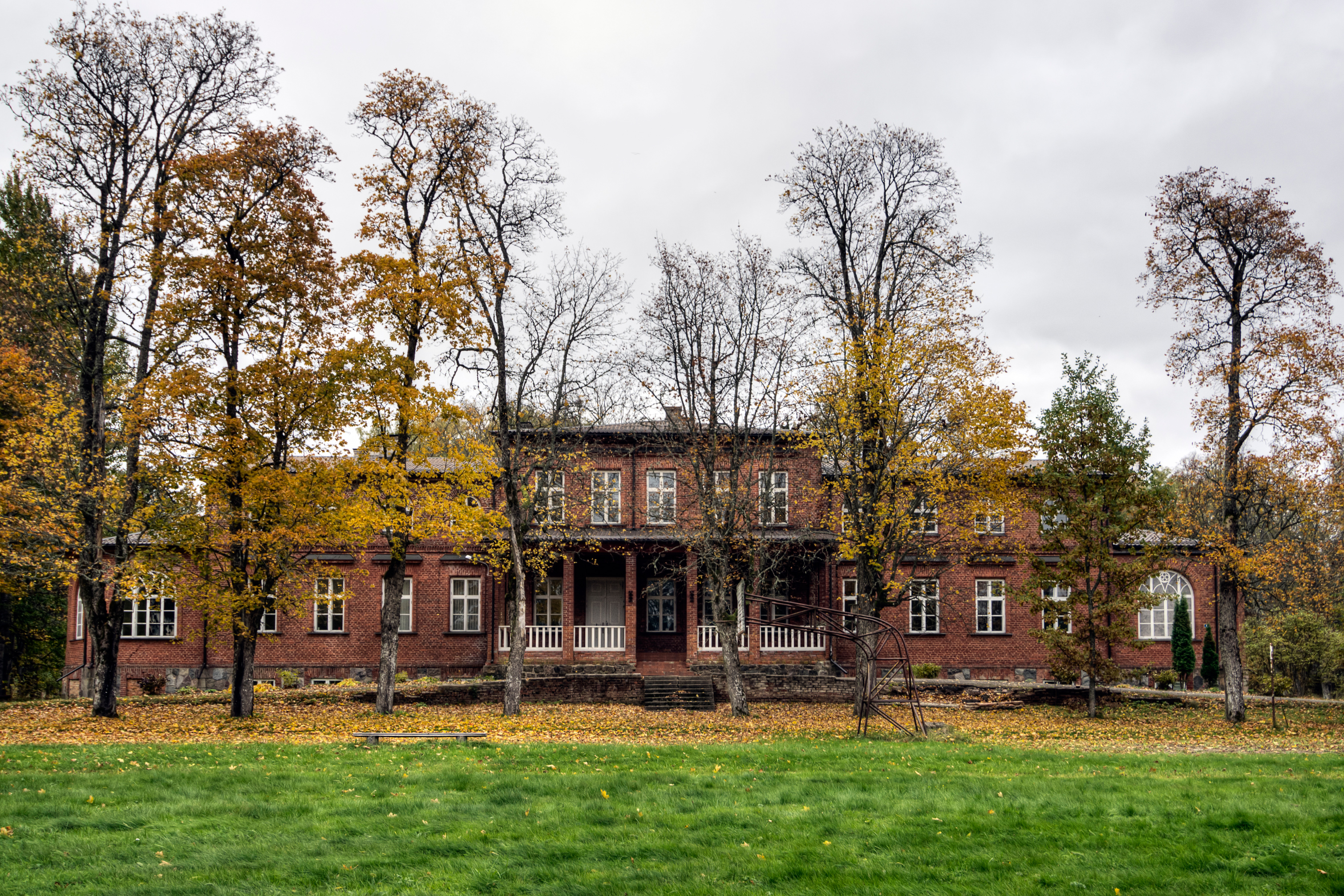 Allikukivi kalevivabriku direktori elamu